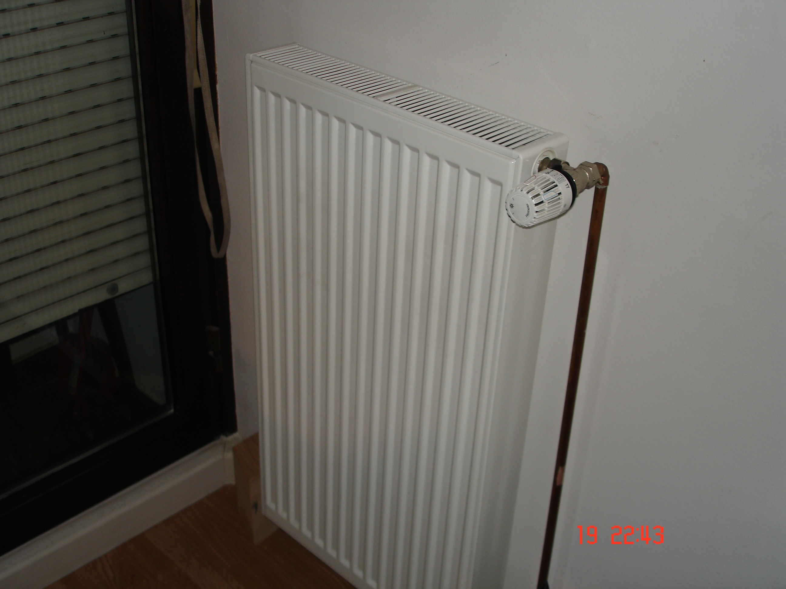 radijator